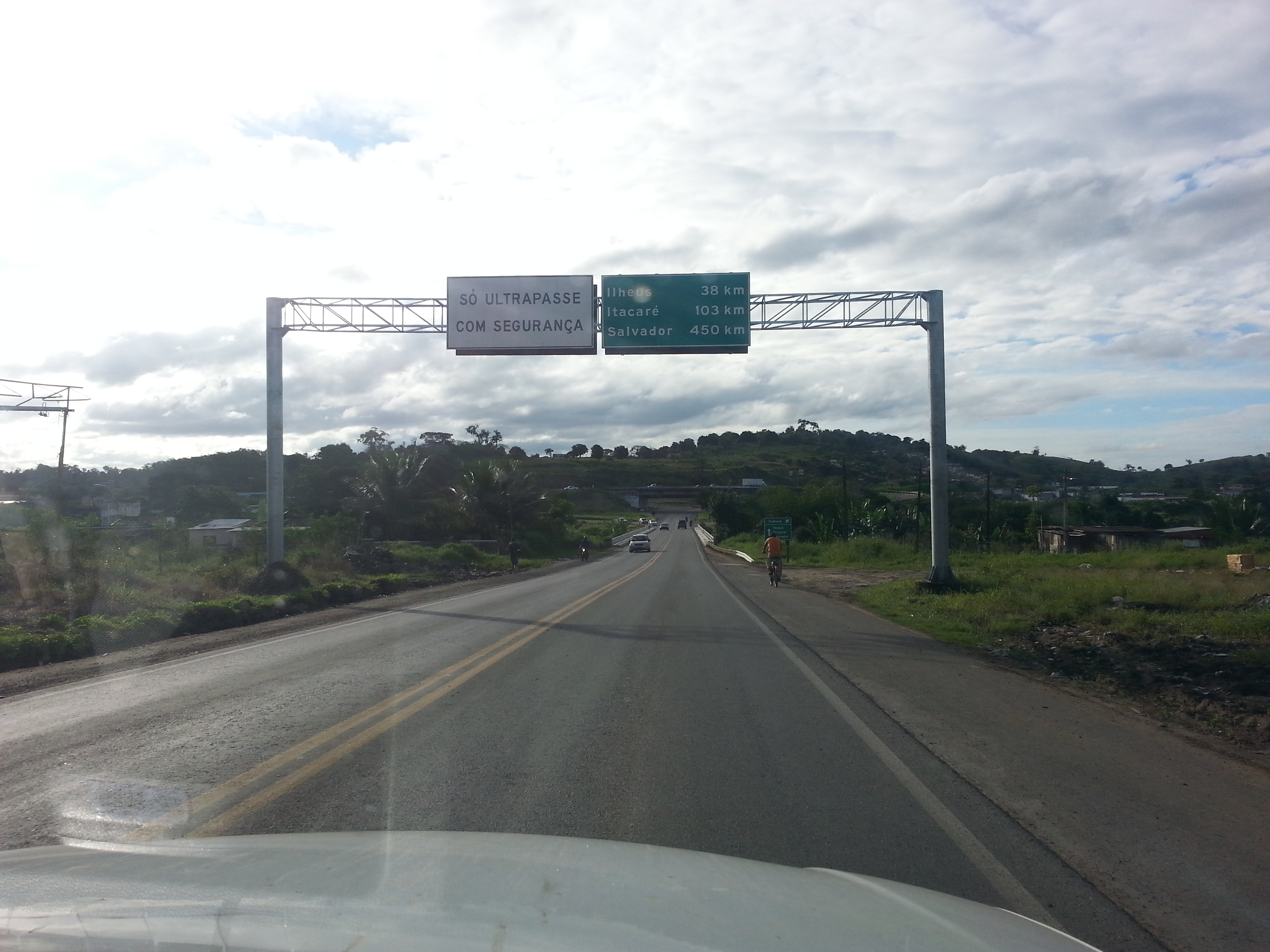 Lomanto Júnior, Itabuna - BA, Brazil